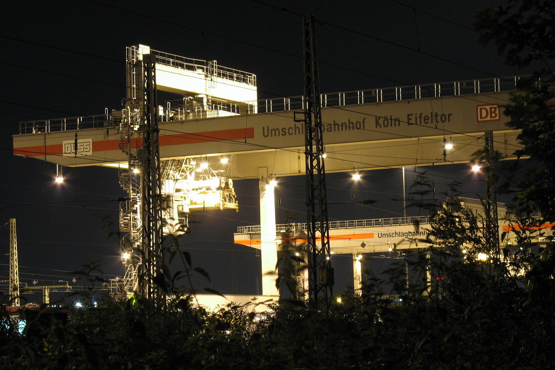 Zwei Kranbrücken am Umschlagbahnhof Köln Eifeltor. Neben dem Logo der Deutschen Bahn ist auf einem der Kräne auch das Logo der Deutschen Umschlaggesellschaft Schiene Straße (DUSS) zu sehen.